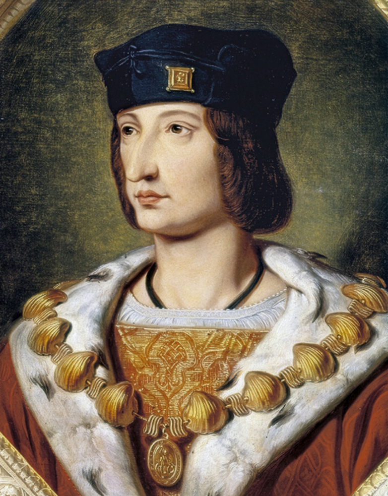 Le Roi Charles VIII en 1498